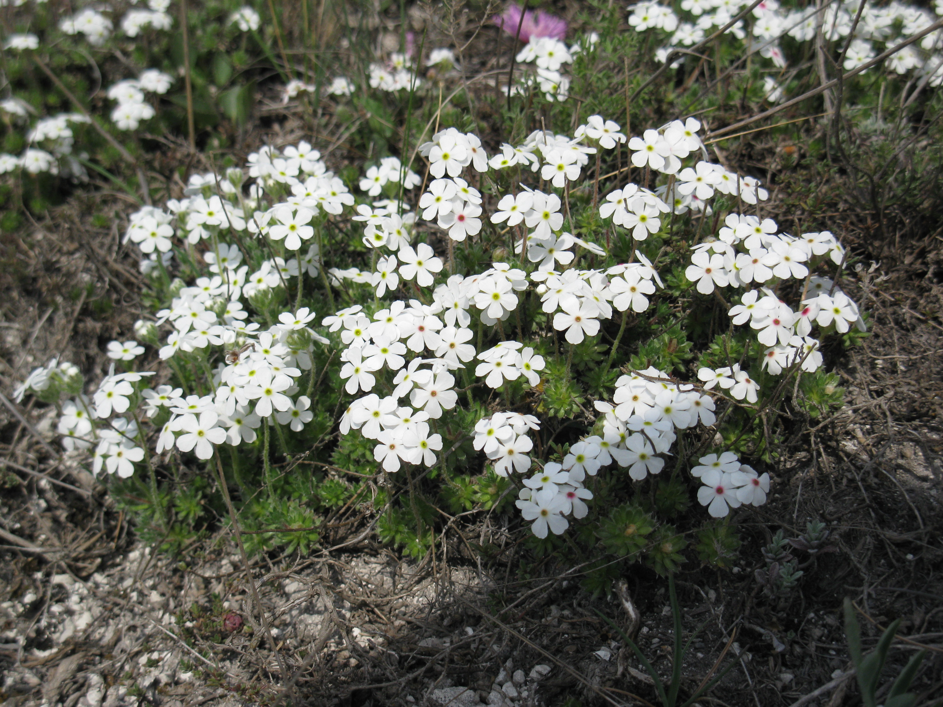 Цветки-розетки проломника Козо-Полянского